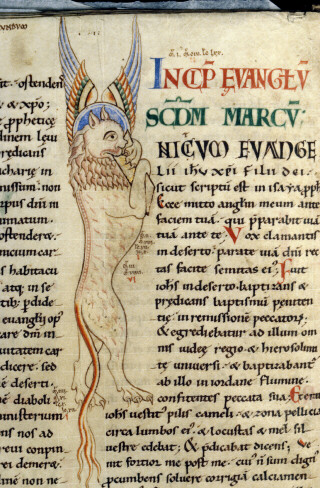 Bible d'Étienne Harding. Lion de saint Marc.